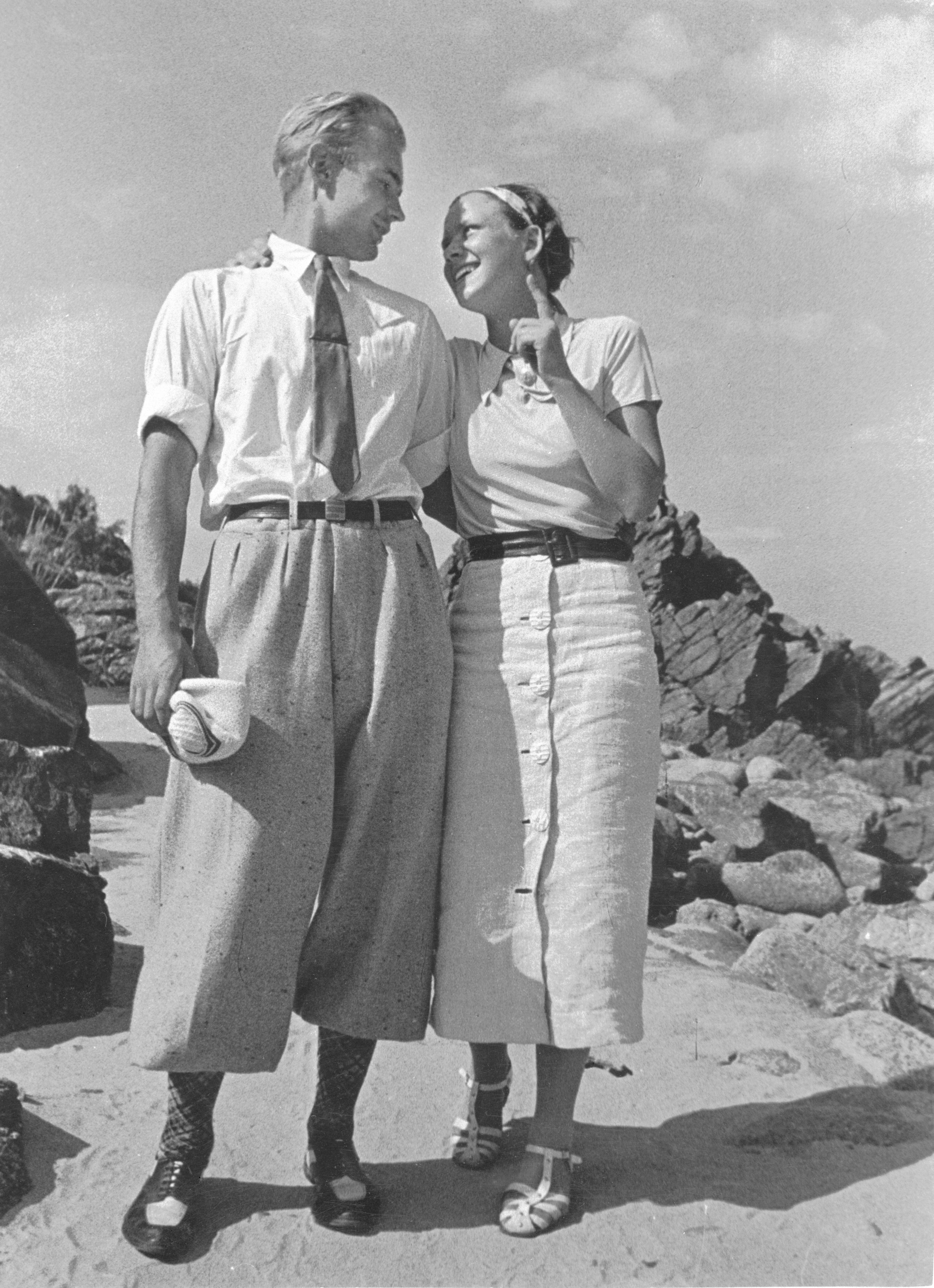 Sommar vid stranden, Sandkaas på Bornholm. Man och kvinna i ledig fritidsklädsel står sida vid sida och håller om varandra, ser varandra djupt i ögonen och ler. Ämnesord: Kläder : Damkläder, Kläder : Herrkläder, Kvinna, Man, Mode, Ungdom, Uppvaktning / Romantik, Årstider : Sommar.